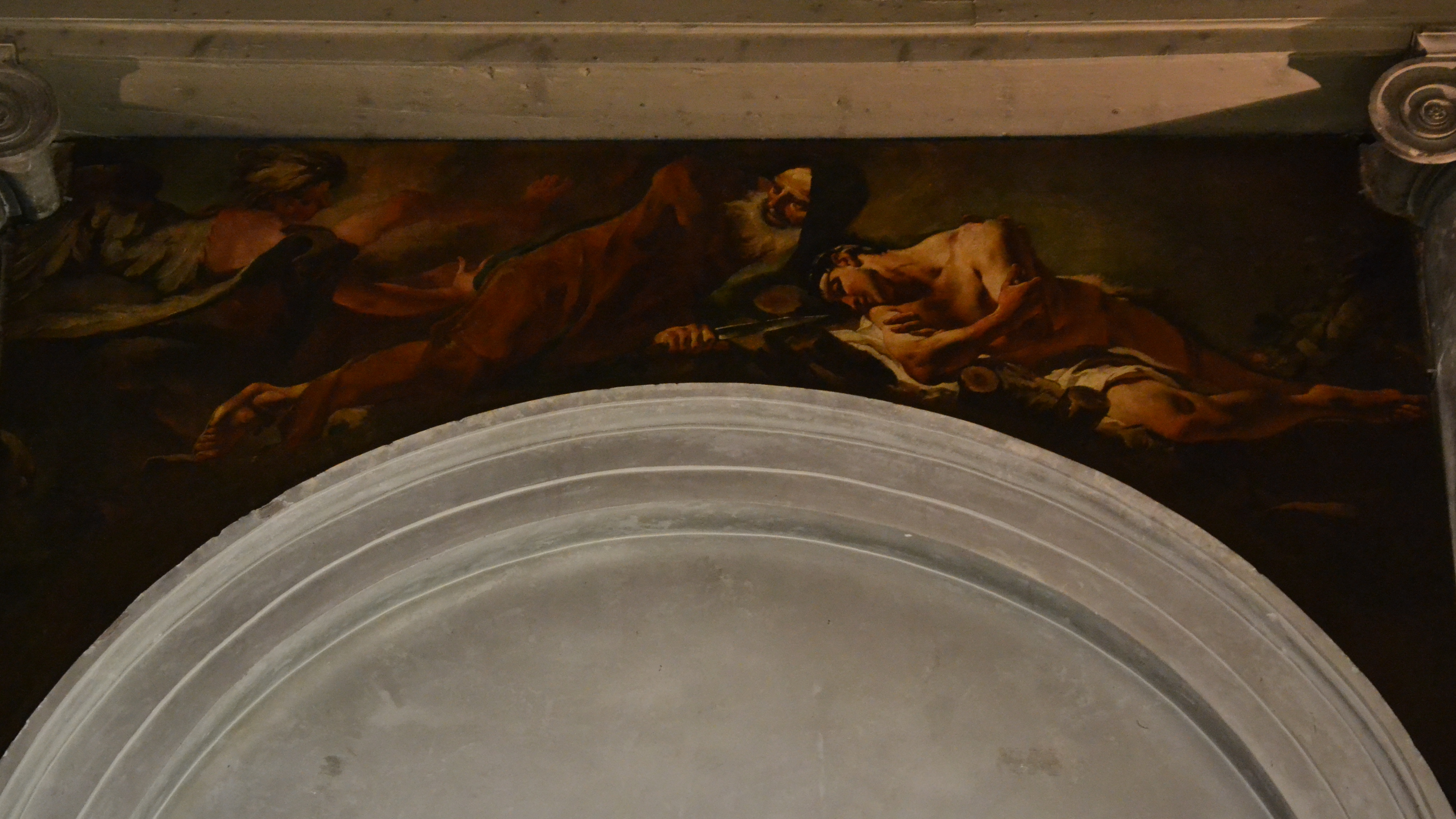 Sacrificio d’Isacco, opera giovanile di Giambattista Tiepolo, Santa Maria dei Derelitti (Venezia), vulgo dell’Ospedaletto